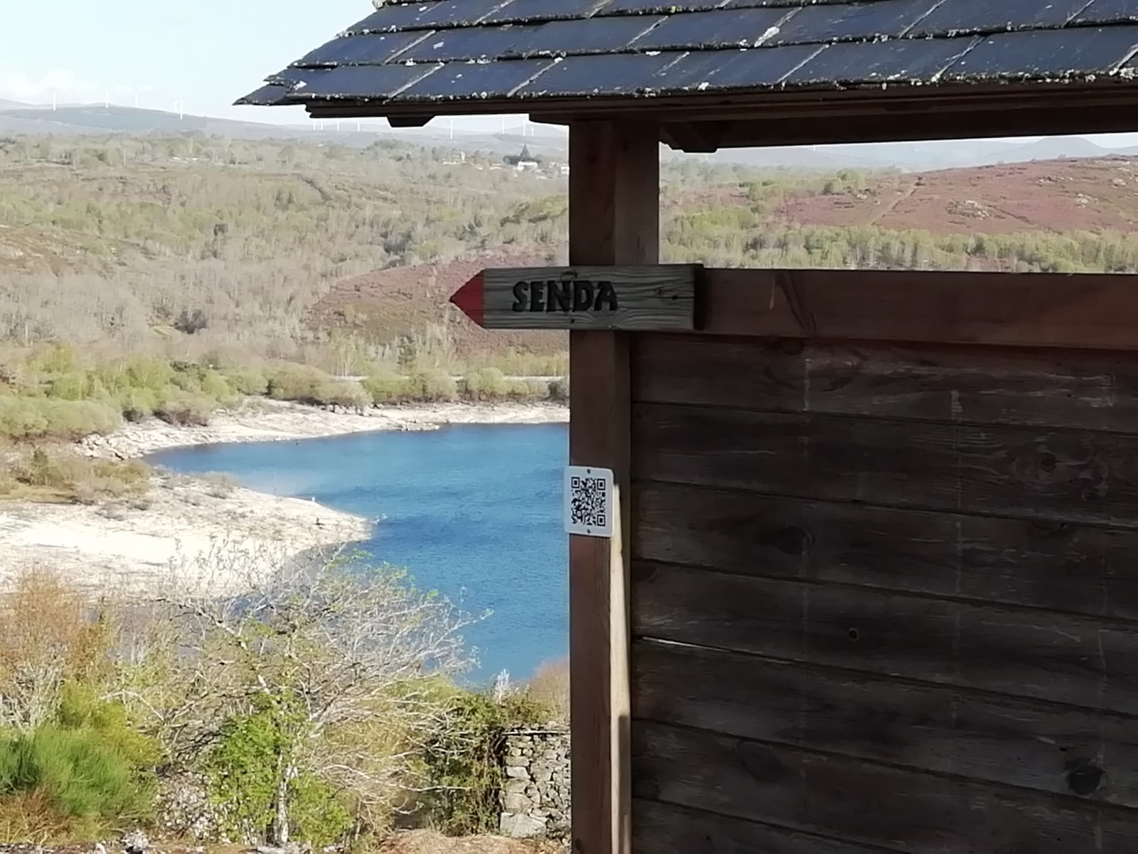 Calzada Romana de Pradomao